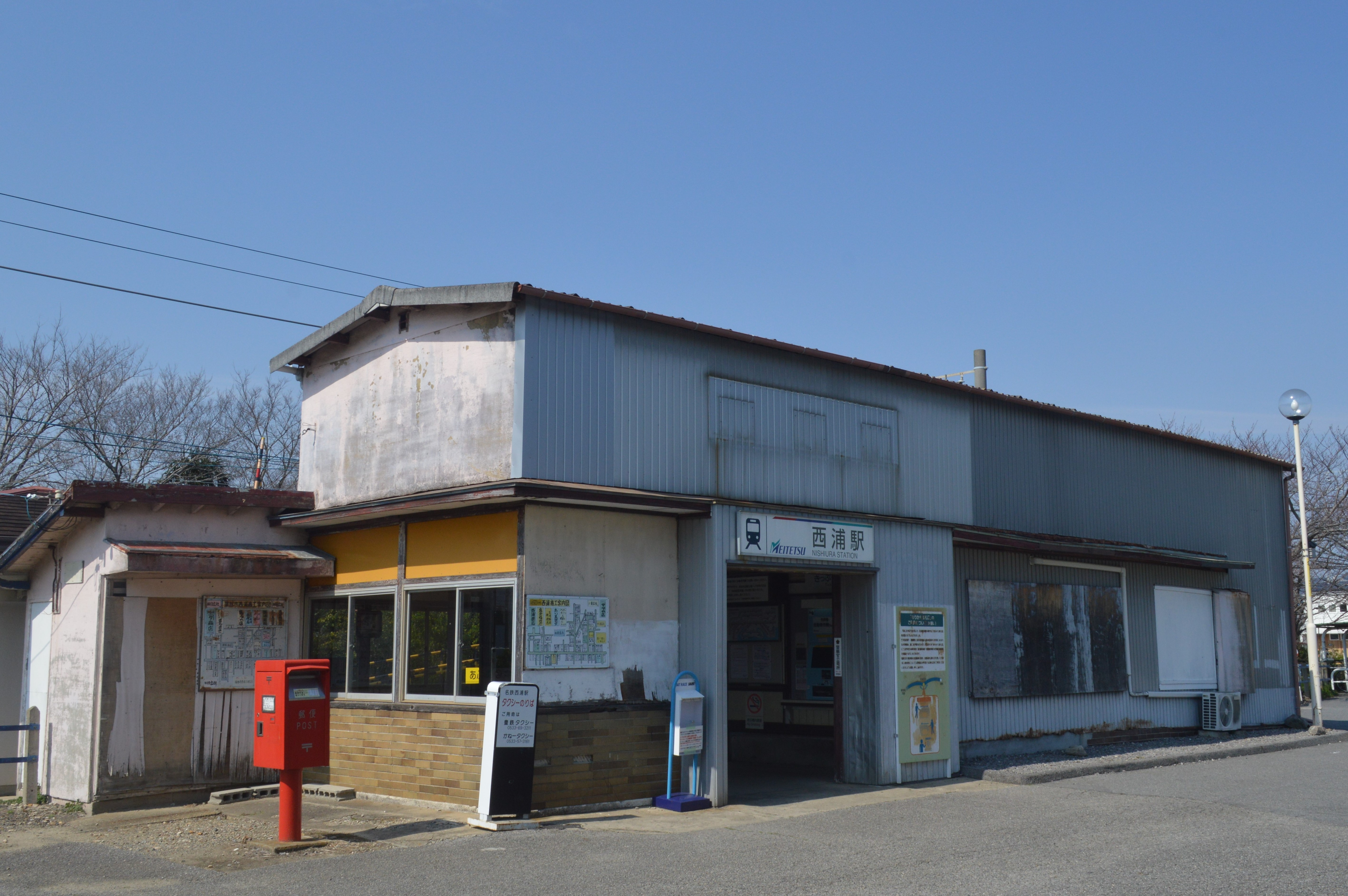 愛知県蒲郡市にある名鉄蒲郡線西浦駅。